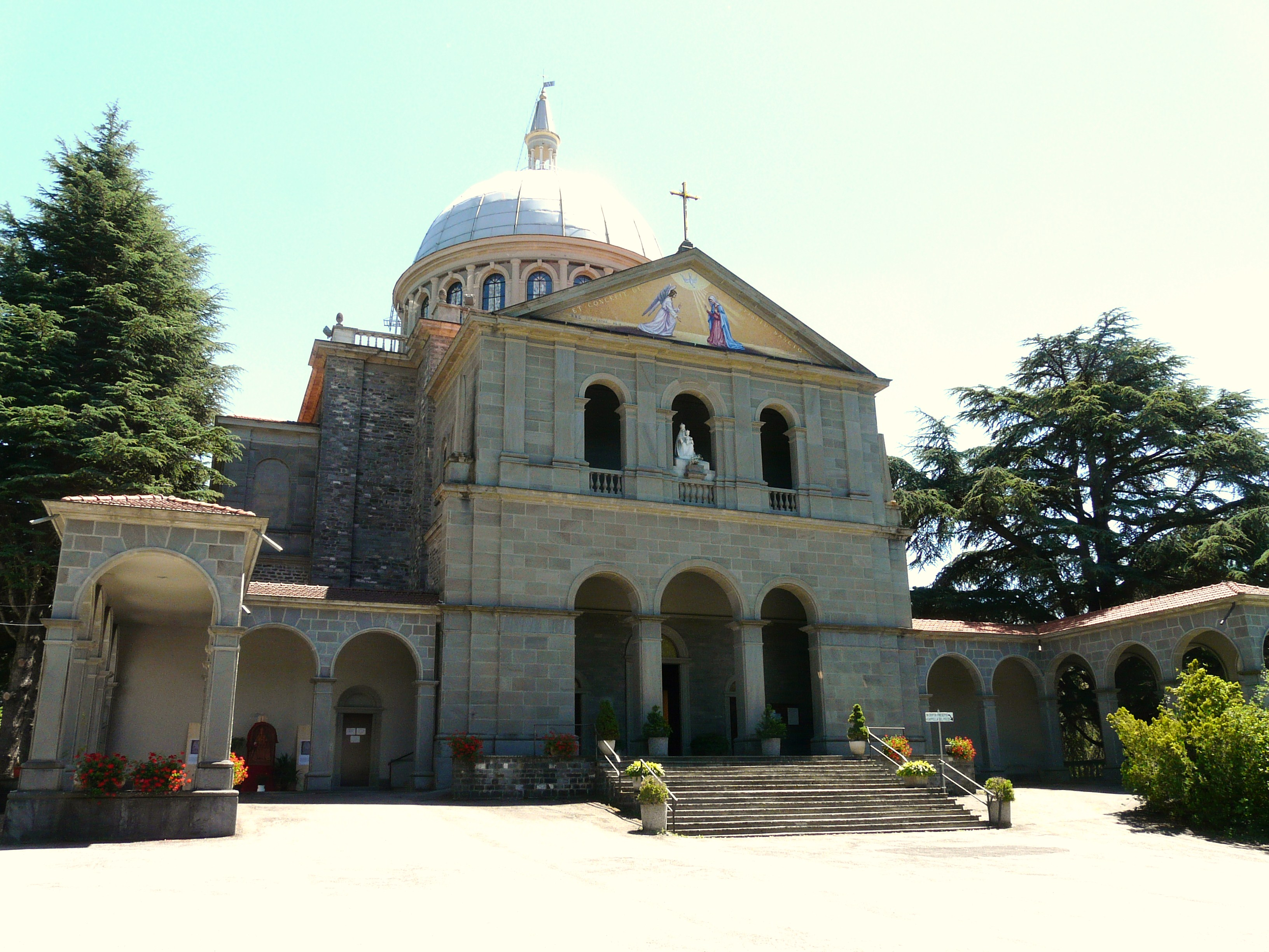 Immagini varie del santuario della Madonna di San Marco, Bedonia, Emilia Romagna, Italia